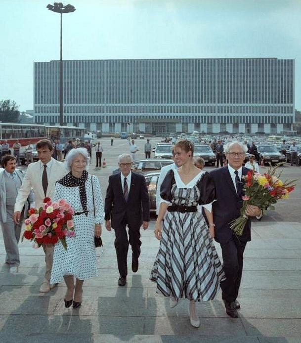 Berlin, Sportlerball im Palast der Republik ADN-ZB/Franke/31.8.84 Berlin: Sportlerball Beim Eintreffen zum Sportlerball im Palast der Republik: Erich Honecker, Generalsekretär des ZK der SED und Vorsitzender des Staatsrates der DDR; Dr. h.c. Margot Honecker, Minister für Volksbildung der DDR (2.v.l.); Willi Stoph, Mitglied des Poltibüros des ZK der SED und Vorsitzender des Ministerrates der DDR. L.: Bahn-Radsprinter Lutz Heßlich; 2.v.r.: Eiskunstlauf-Olympiasiegerin Katarina Witt. [Berlin.- Politiker und Sportler (u.a. Kati Witt) auf dem Weg zum Sportlerball im Palast der Republik, im Hintergrund Gebäude des Außenministeriums] Abgebildete Personen: Honecker, Erich: Staatsratsvorsitzender, Generalsekretär des ZK der SED, DDR (GND 118553399) Honecker, Margot: Ministerin für Volksbildung, SED, DDR (GND 122782933) Heßlich, Lutz: Radrennsportler, DDR Witt, Katarina: Eiskunstläuferin, SC Karl-Marx-Stadt, Olympiade 1984 und 1988, DDR (GND 11884508X) Stoph, Willi: Ministerpräsident, Staatsratsvorsitzender, Armeegeneral, SED, DDR